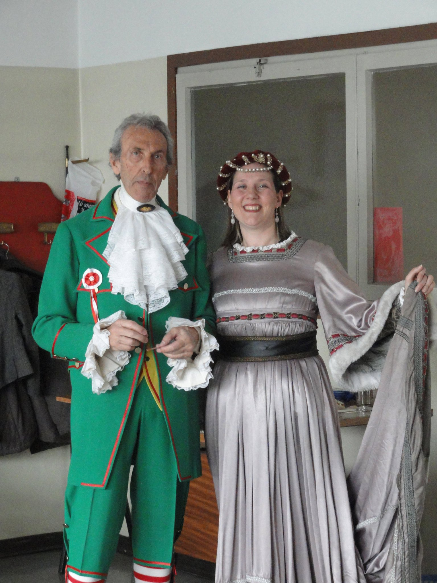 Corteo Storico Carnevale Ambrosiano 2011